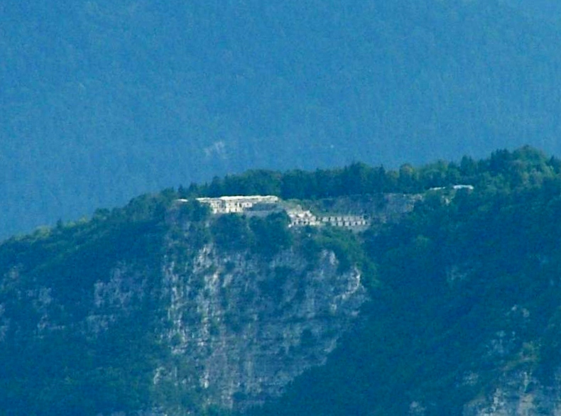 Il forte di Corbin